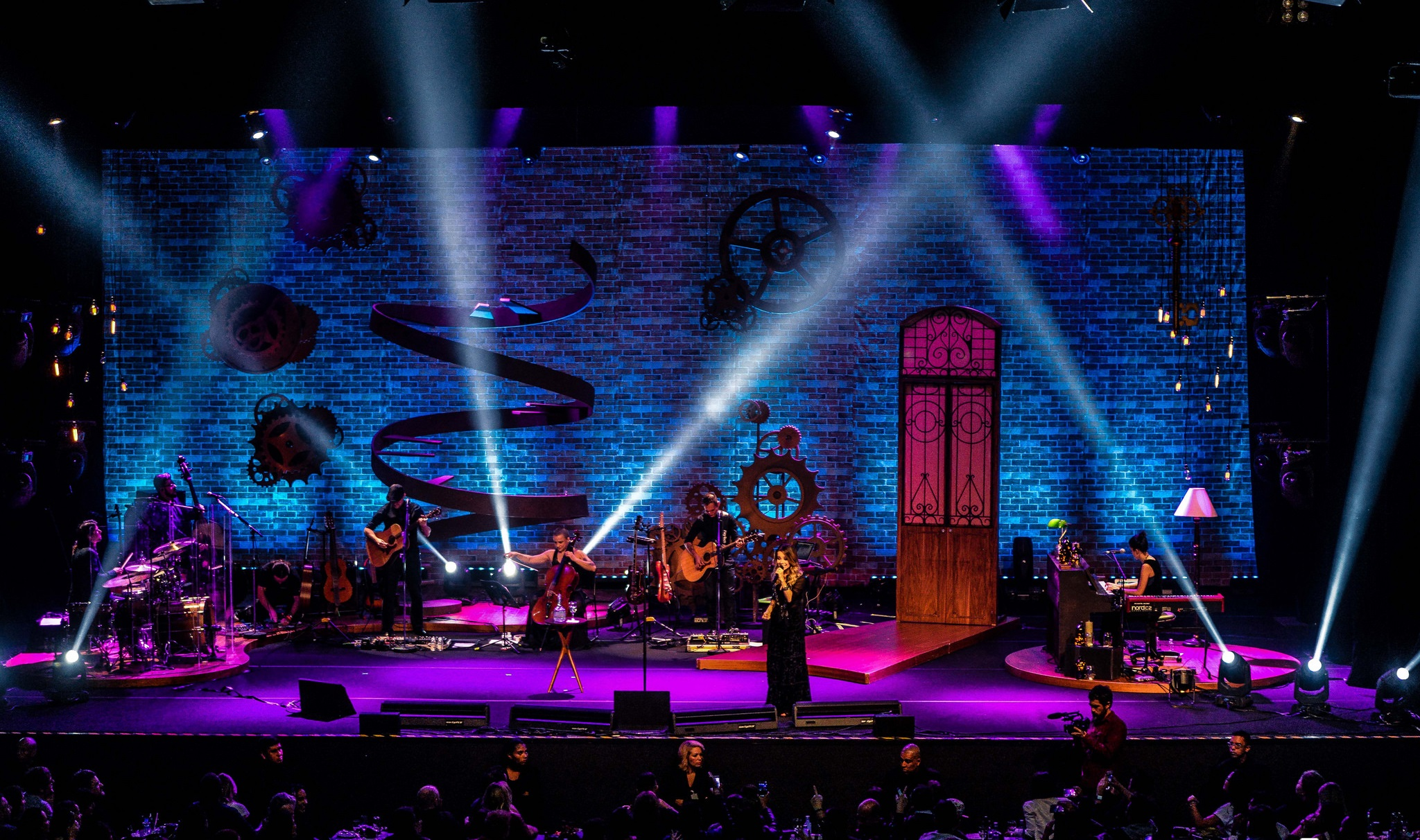 Sandy no show da estreia da Turnê Meu Canto em maio de 2016.